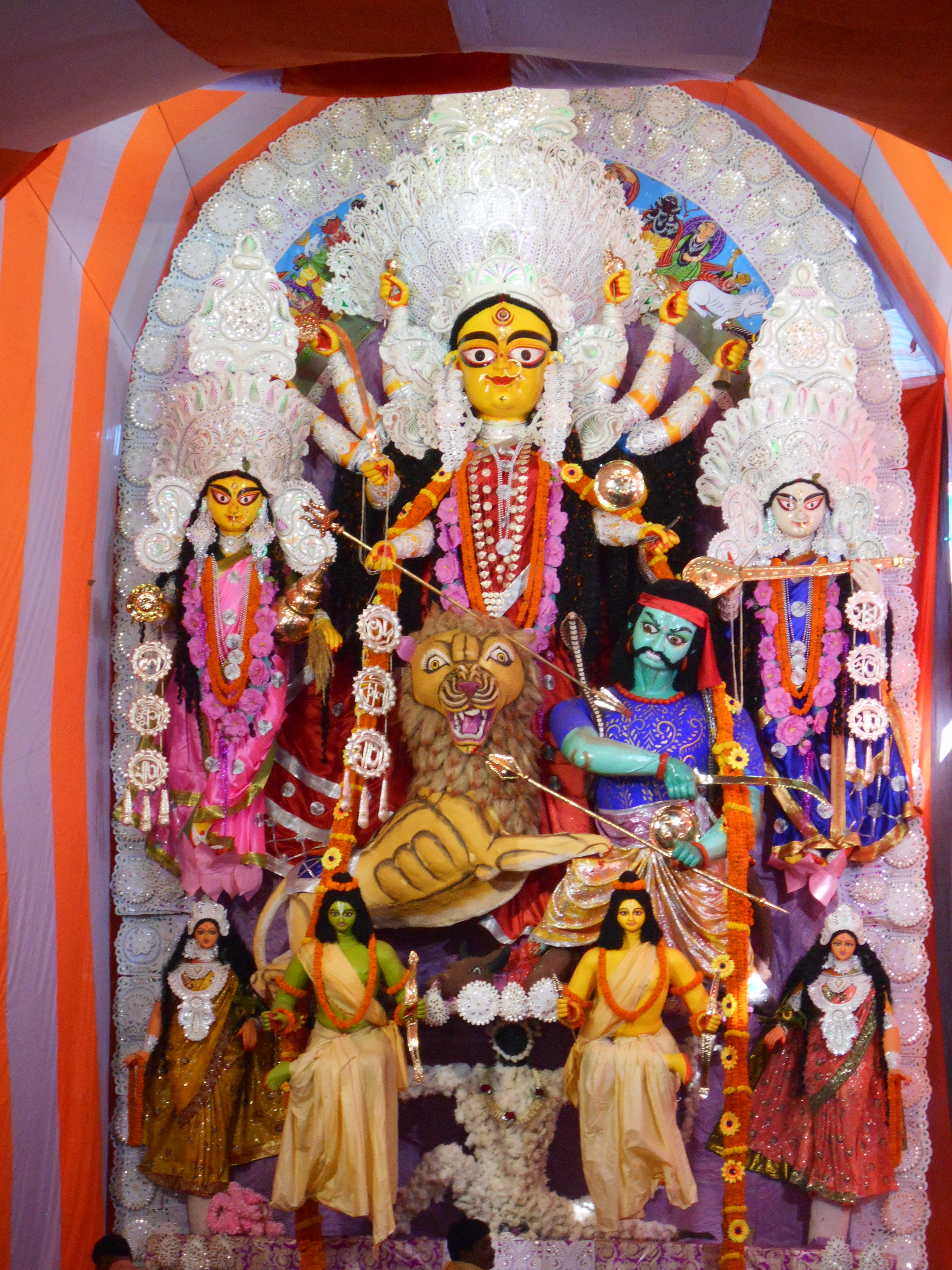 নবদ্বীপ রাসযাত্রায় পূজিত ভদ্রকালী মাতা